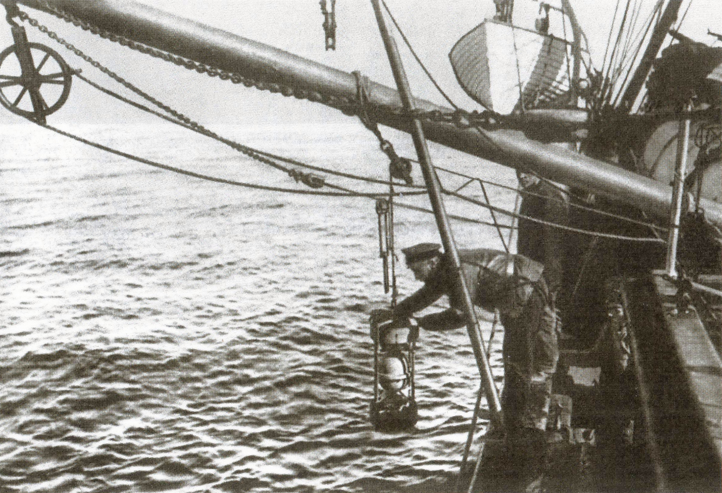 Гидрограф А.В. Колчак по время экспедиции за работой